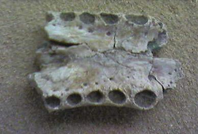 Asiatosuchus fossil, from the Institut de Paleontologia Miquel Crusafont